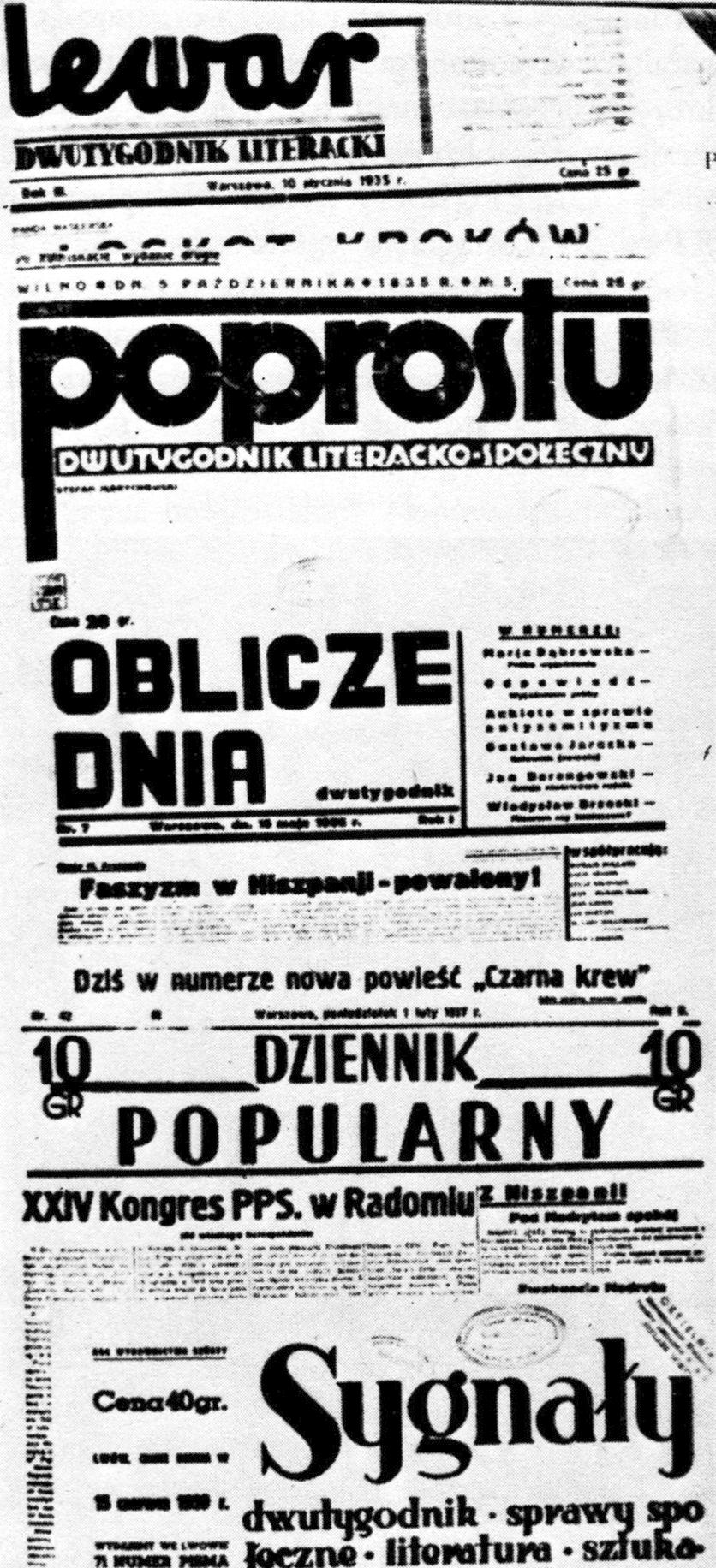 Winiety kilku czasopism jednolitofrontowych